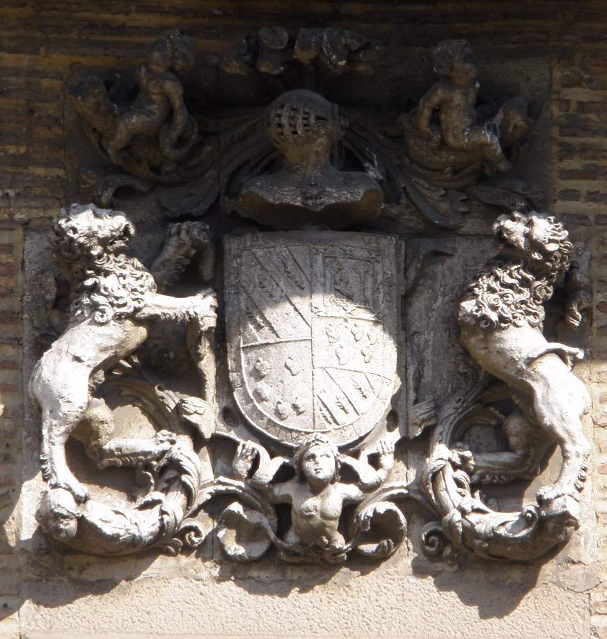 barrio de Betoño, en Vitoria-Gasteiz